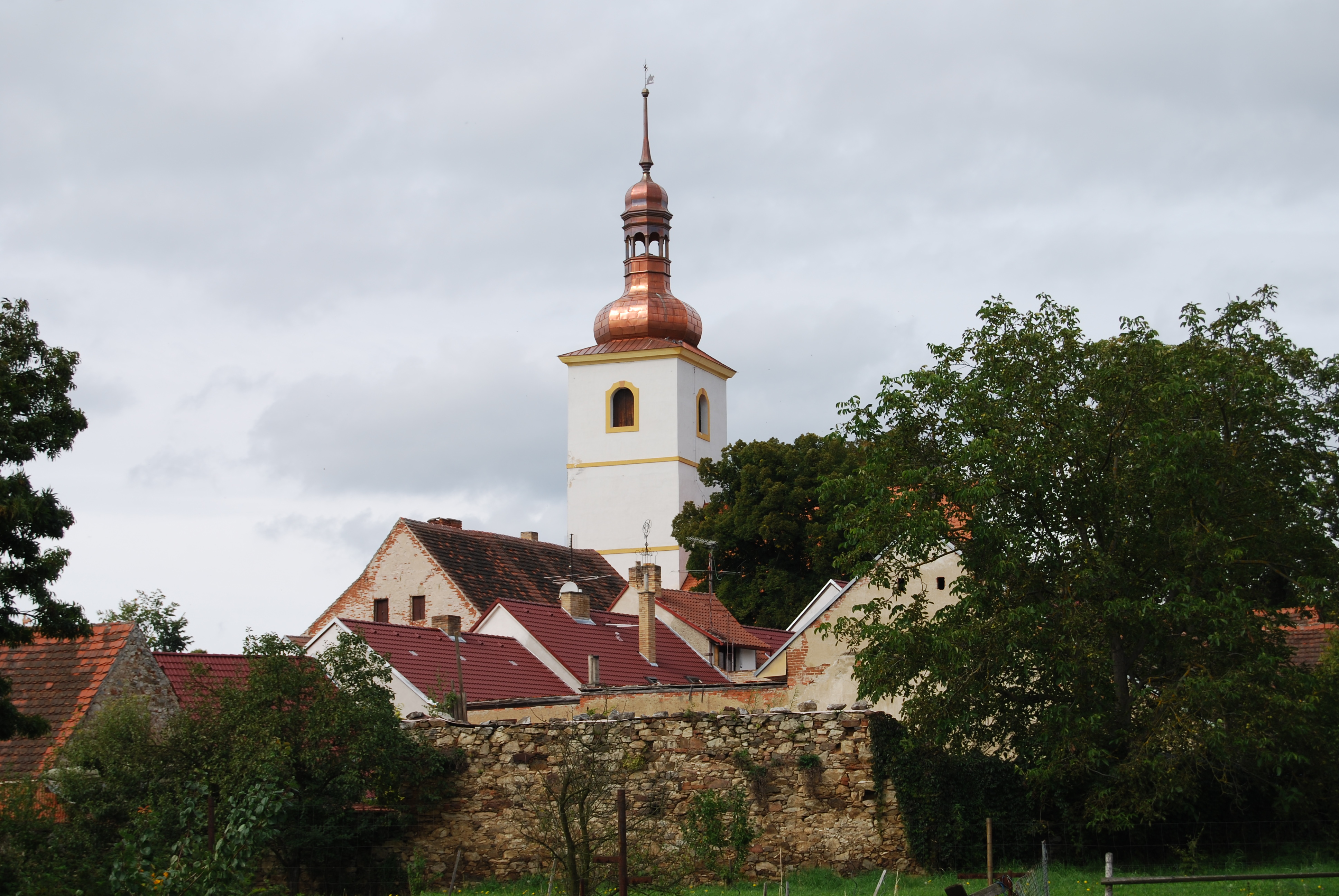 Pohled na kostel sv. Martina. Radomyšl. Okres Strakonice. Česká republika.